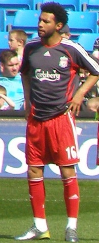 Jermaine Pennant